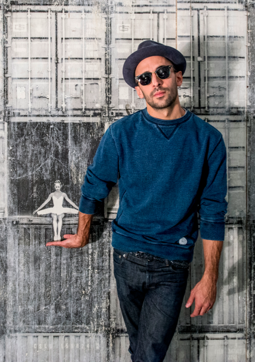 Ce portrait a été pris à la Galerie Perrotin de Paris en 2015 lors de l'exposition Decade de l'artiste JR.